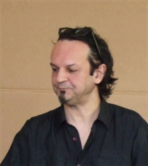 Leo Lukas auf dem DortCon, April 2011